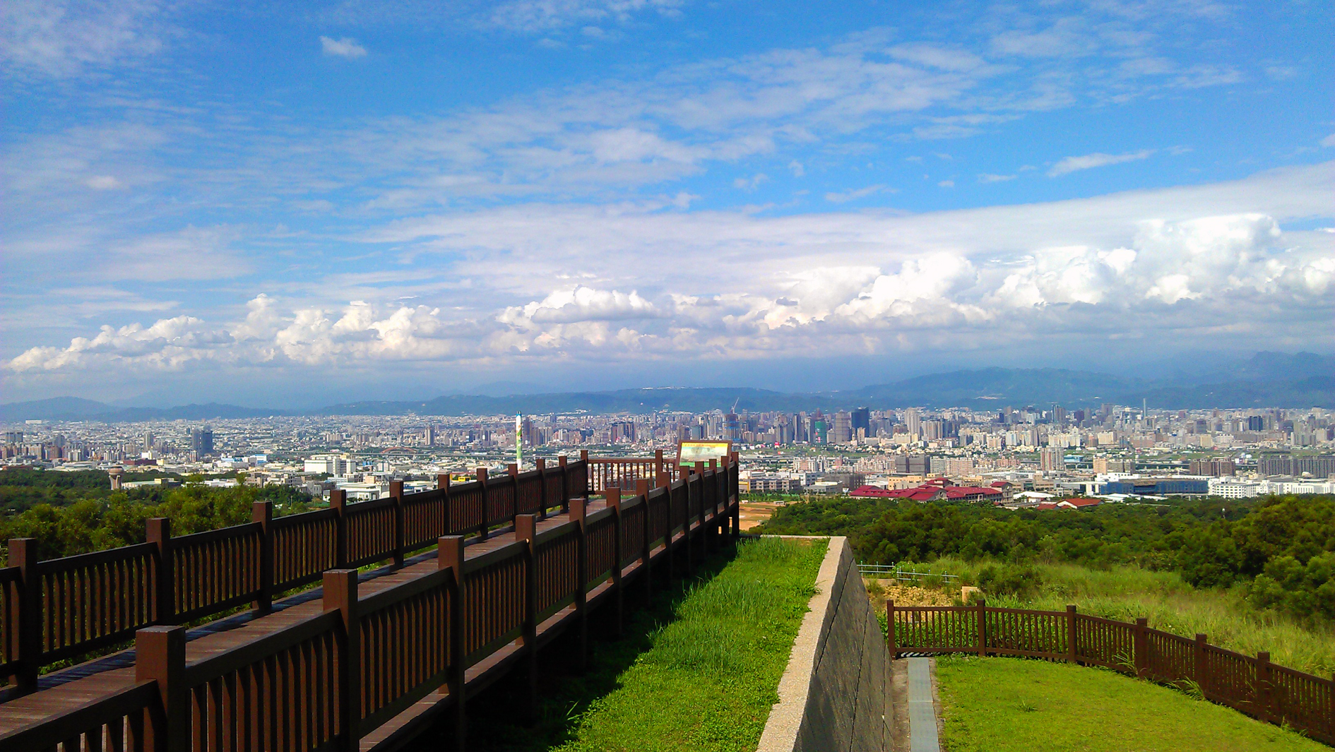 中文（台灣）: 望高寮夜景公園俯視台中盆地